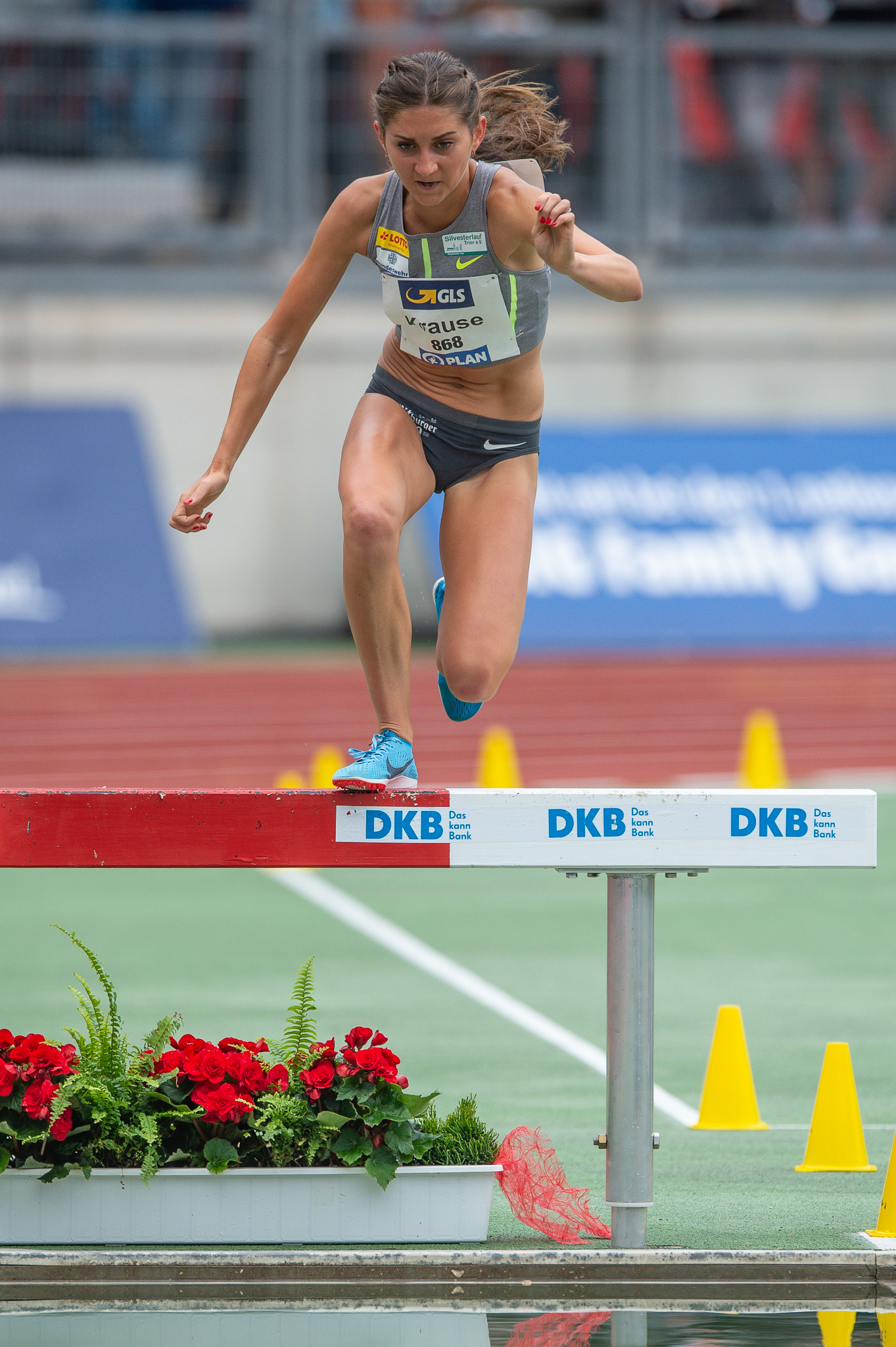 3000 Meter Hindernislauf,DLV,Deutsche Leichtathletik Meisterschaften 2018,Deutscher Leichtathletik-Verband,Gesa Felicitas Krause,Max-Morlock-Stadion,Silvesterlauf Trier,Steeplechase